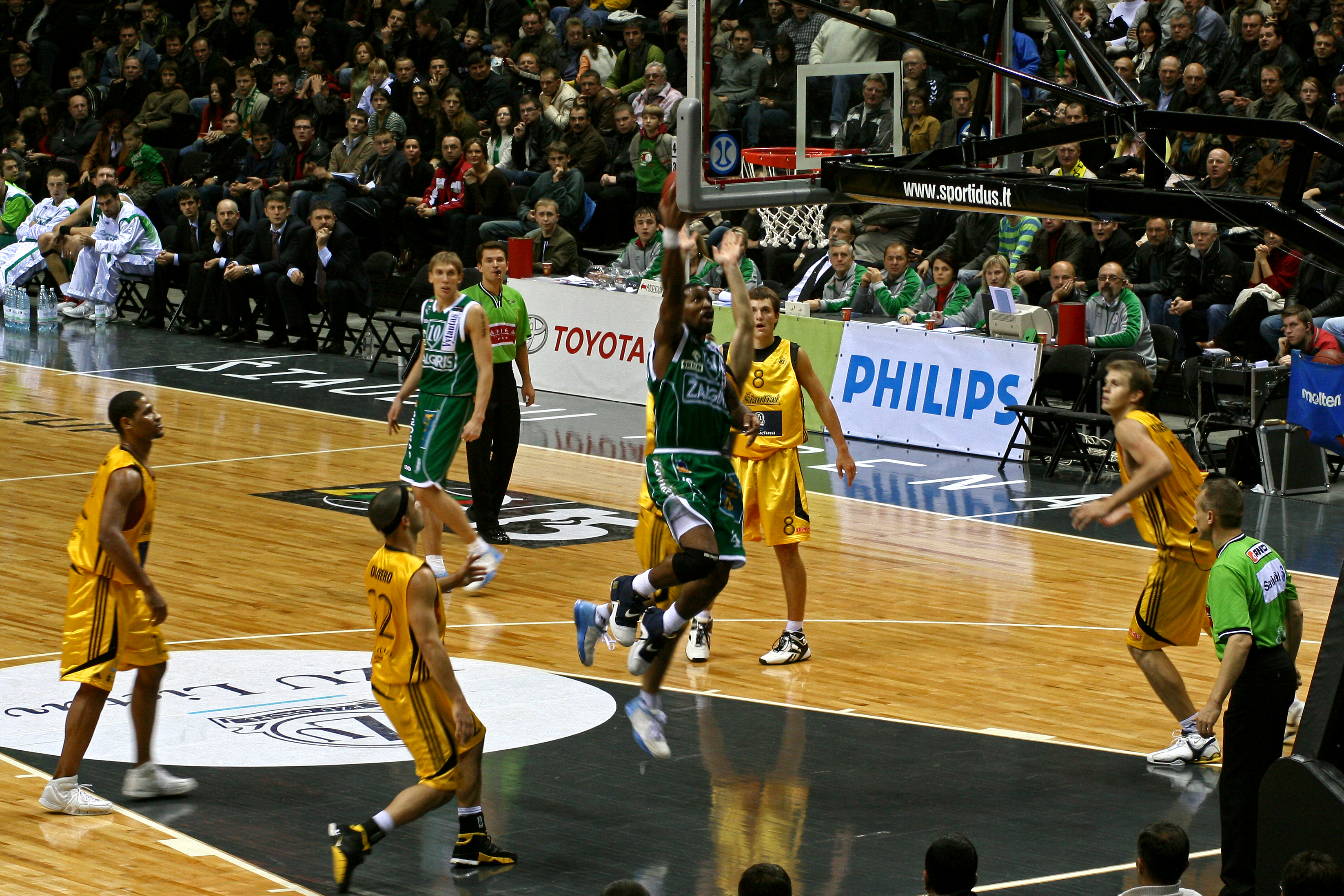 Siauliai - Zalgiris. Basketball match in Siauliai.